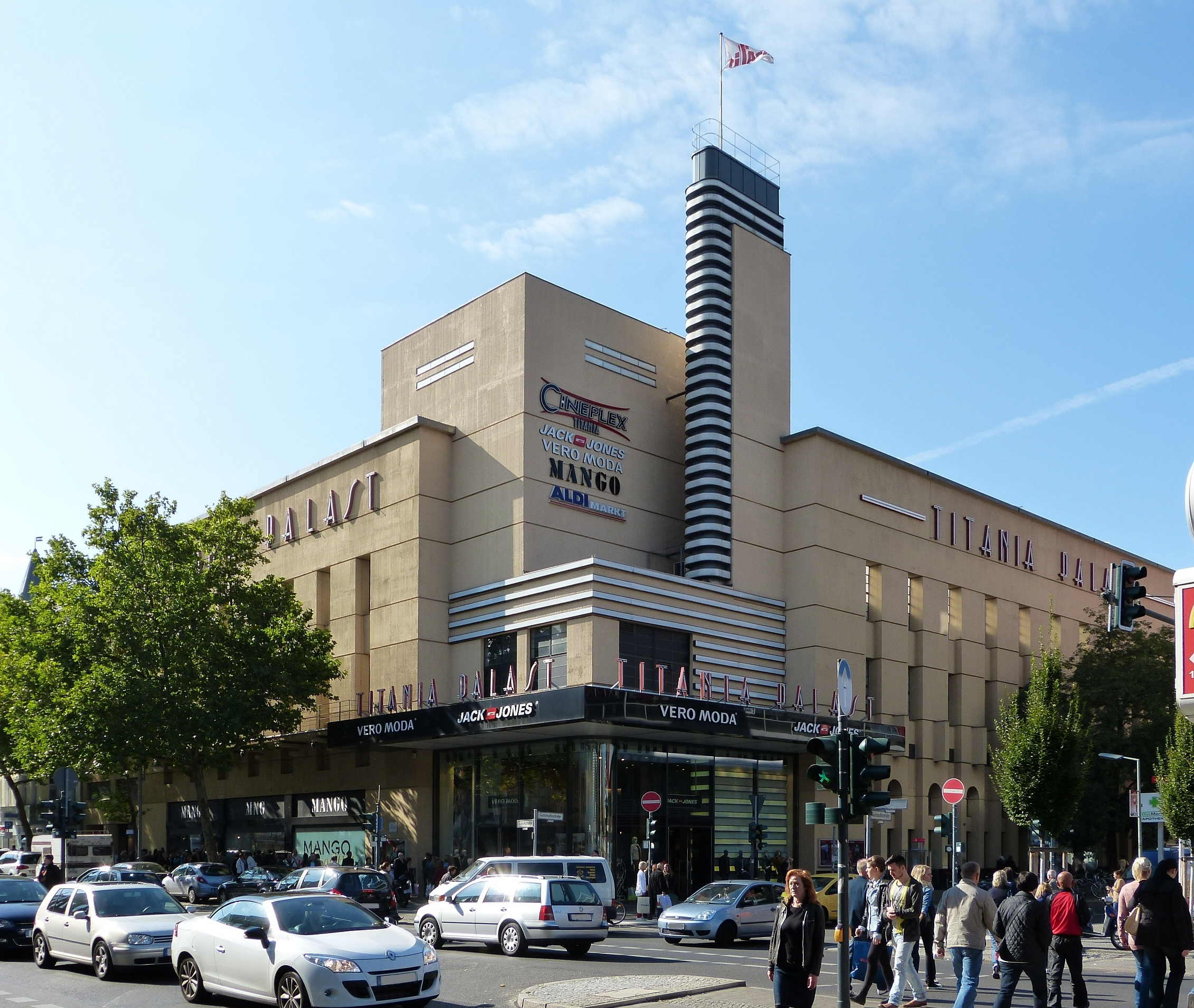 Titaniapalast, Schloßstraße 4-5/ Gutsmuthsstraße 28